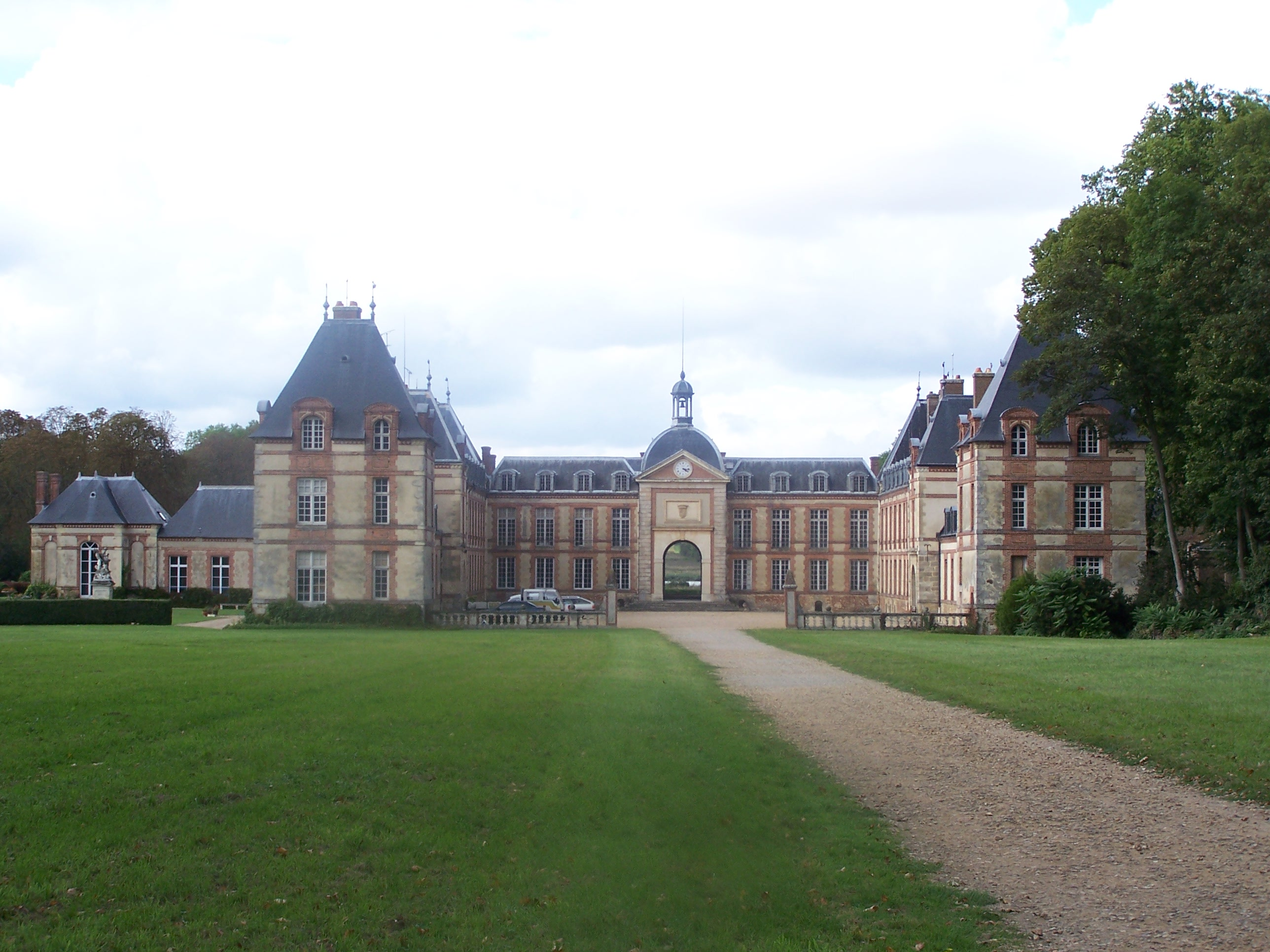 Château de Jouars-Pontchartrain (Yvelines, France)